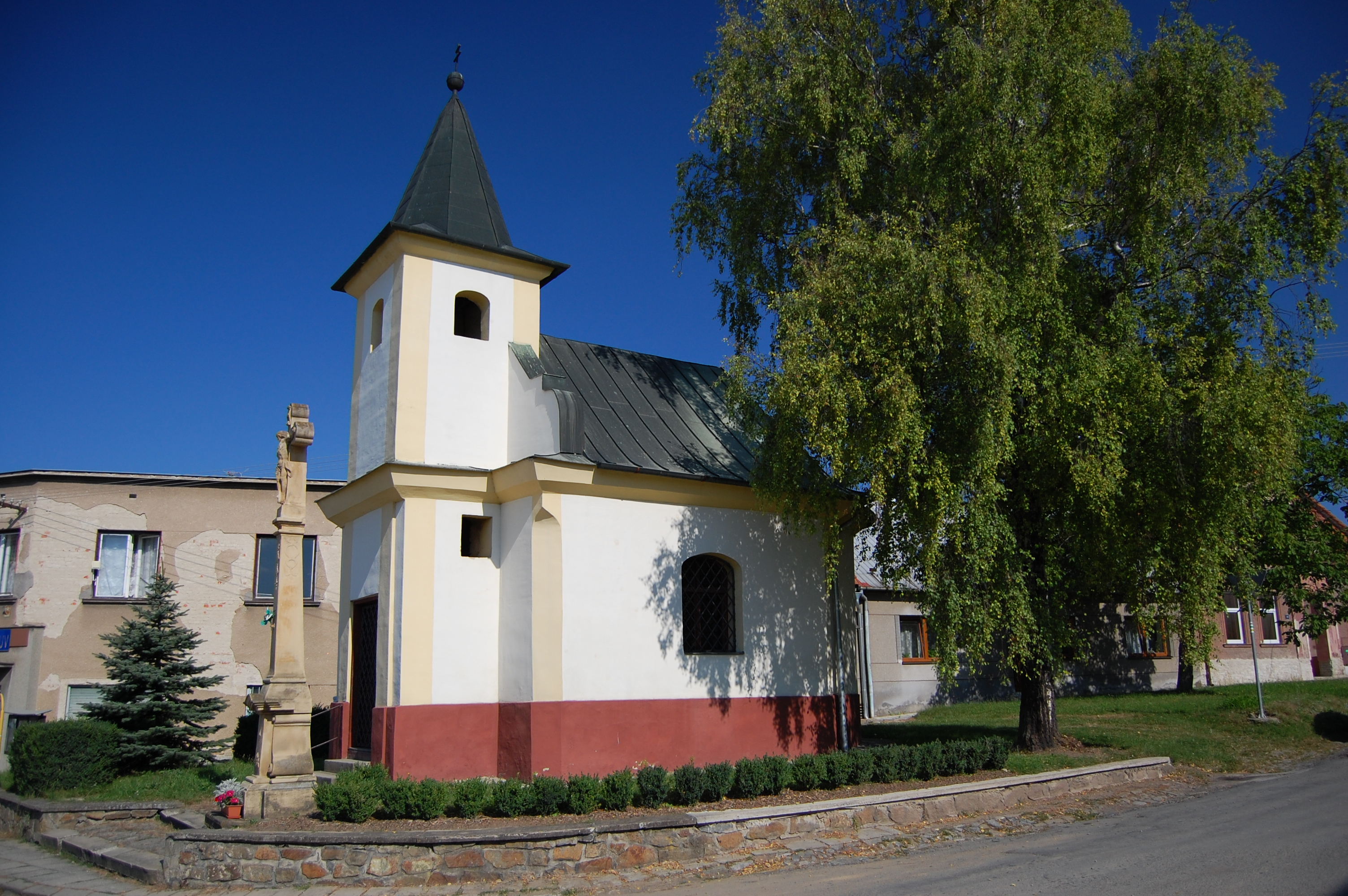 Kaple Obětování Panny Marie na návsi, Čelechovice na Hané, okres Prostějov